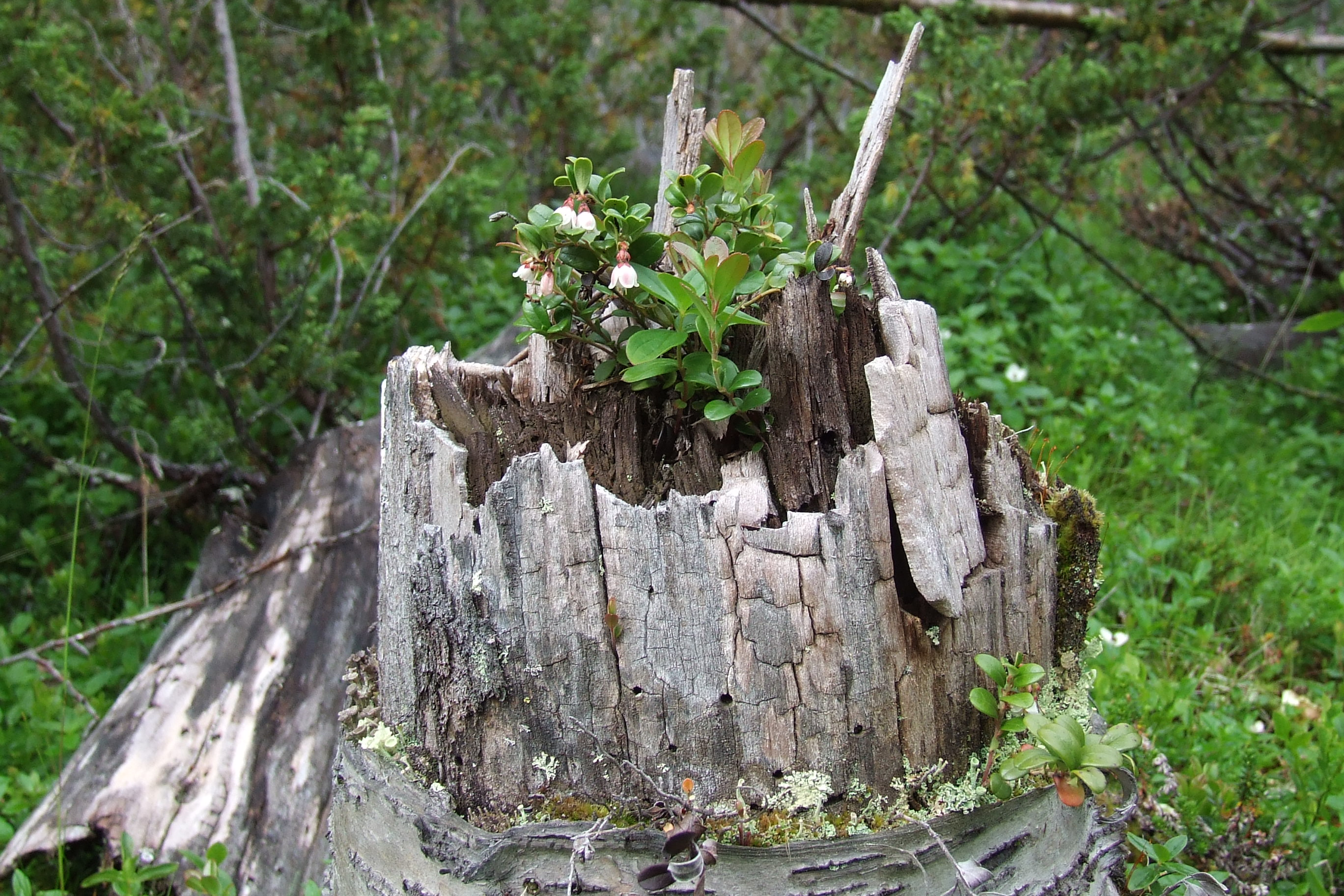 Preiselbeeren wachsen auf einem vermoderten Baumstumpf einer Birke in Schweden